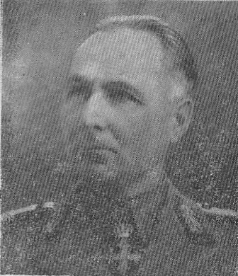 Generalul de divizie Leonard Mociulschi (1889-1979) la reîntoarcerea în România de pe frontul din Cehoslovacia în aprilie 1945